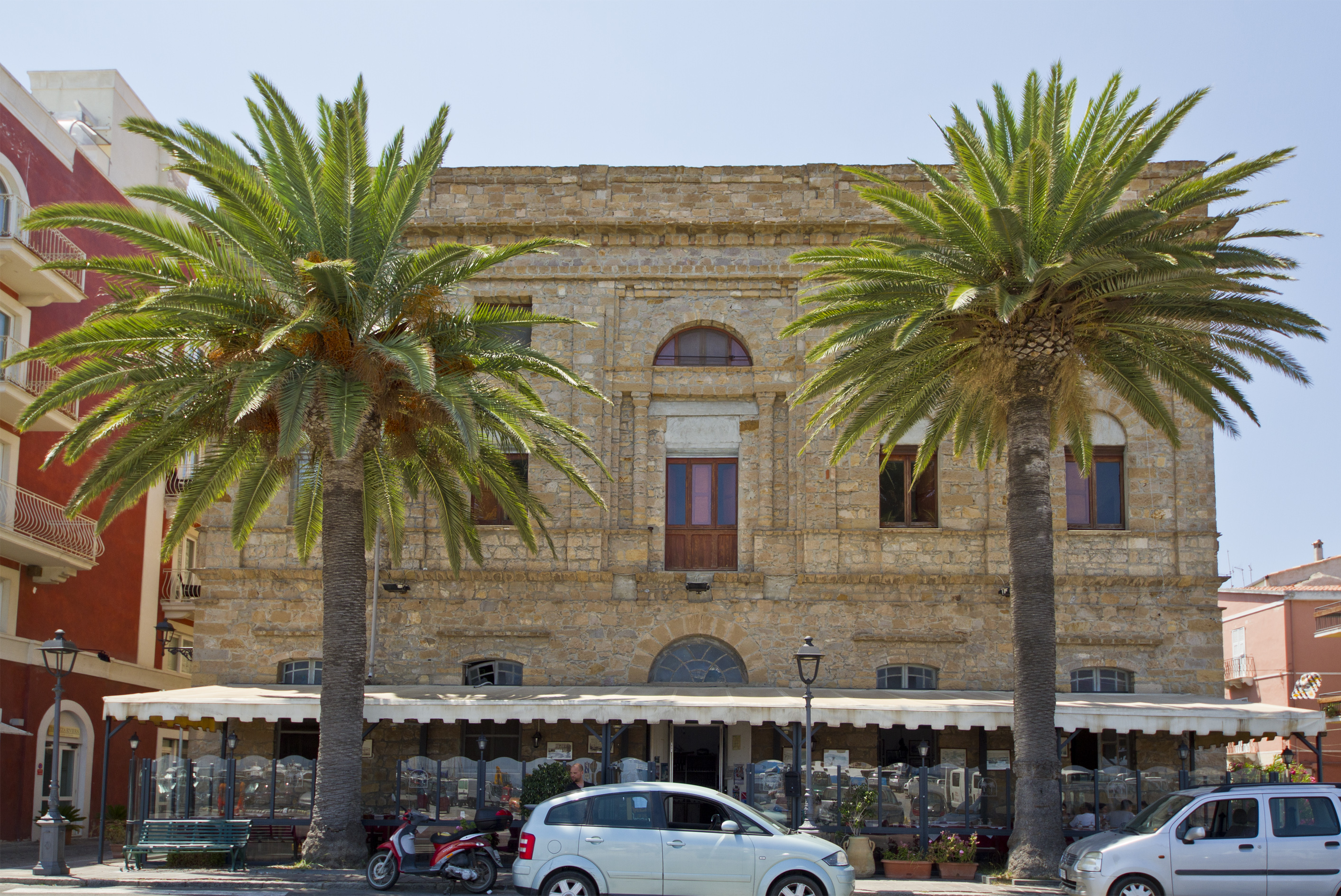 Cine Teatro Cavallera, Carloforte, Isola di San Pietro, Carbonia-Iglesias, Sardinia, Italy